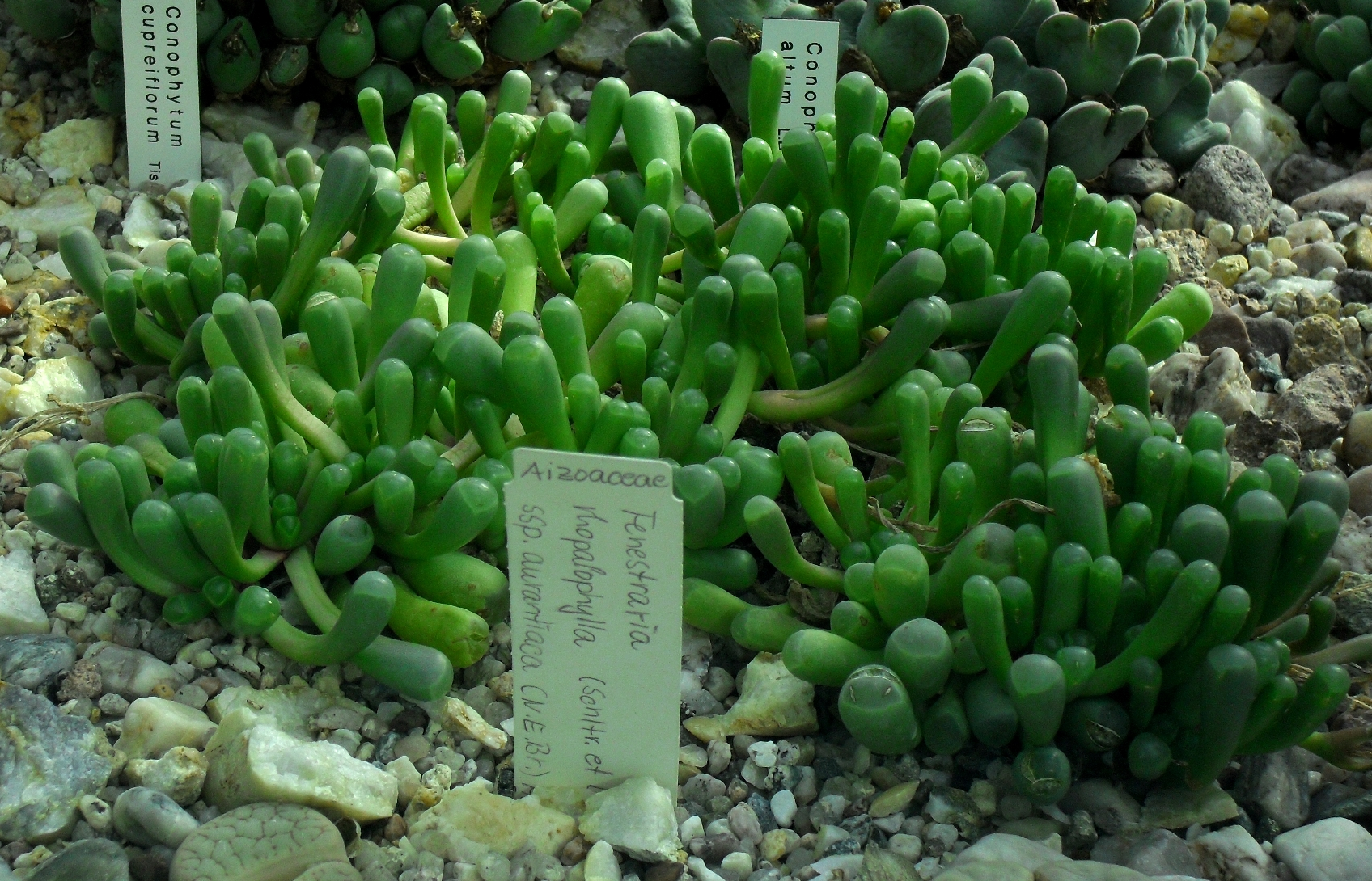 Fenestraria rhopalophylla - Botanischer Garten Leipzig